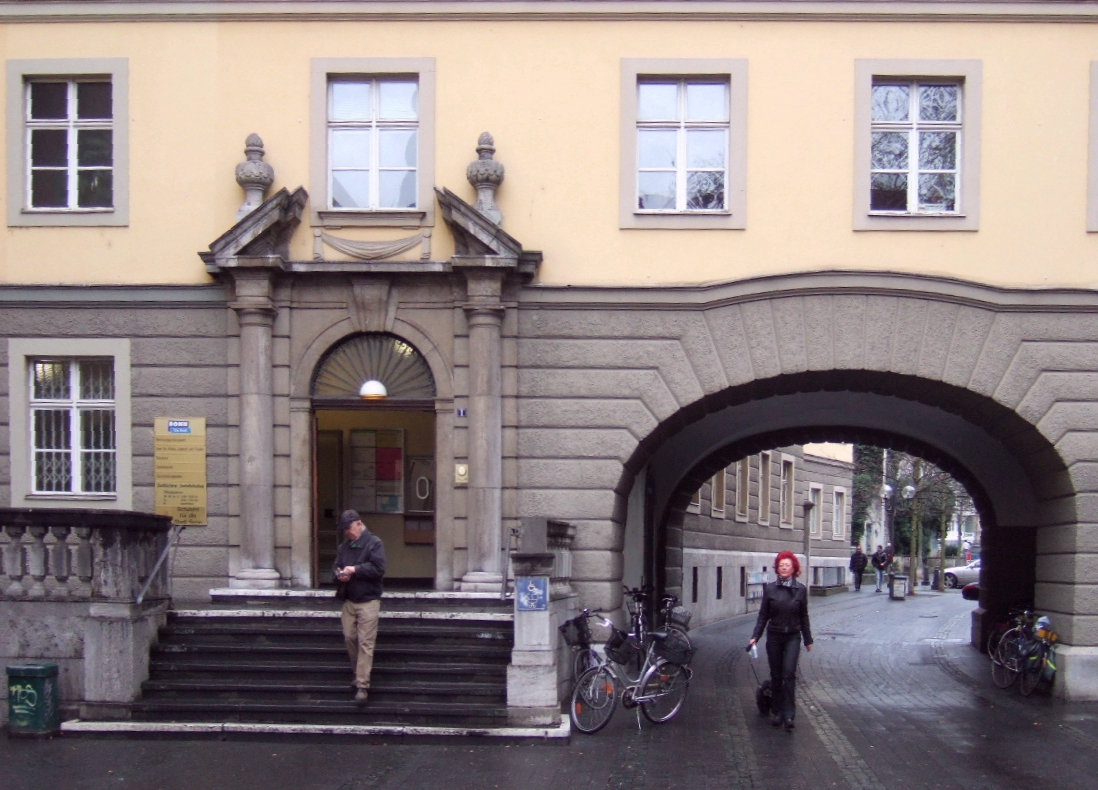 Altes Stadthaus in Bonn